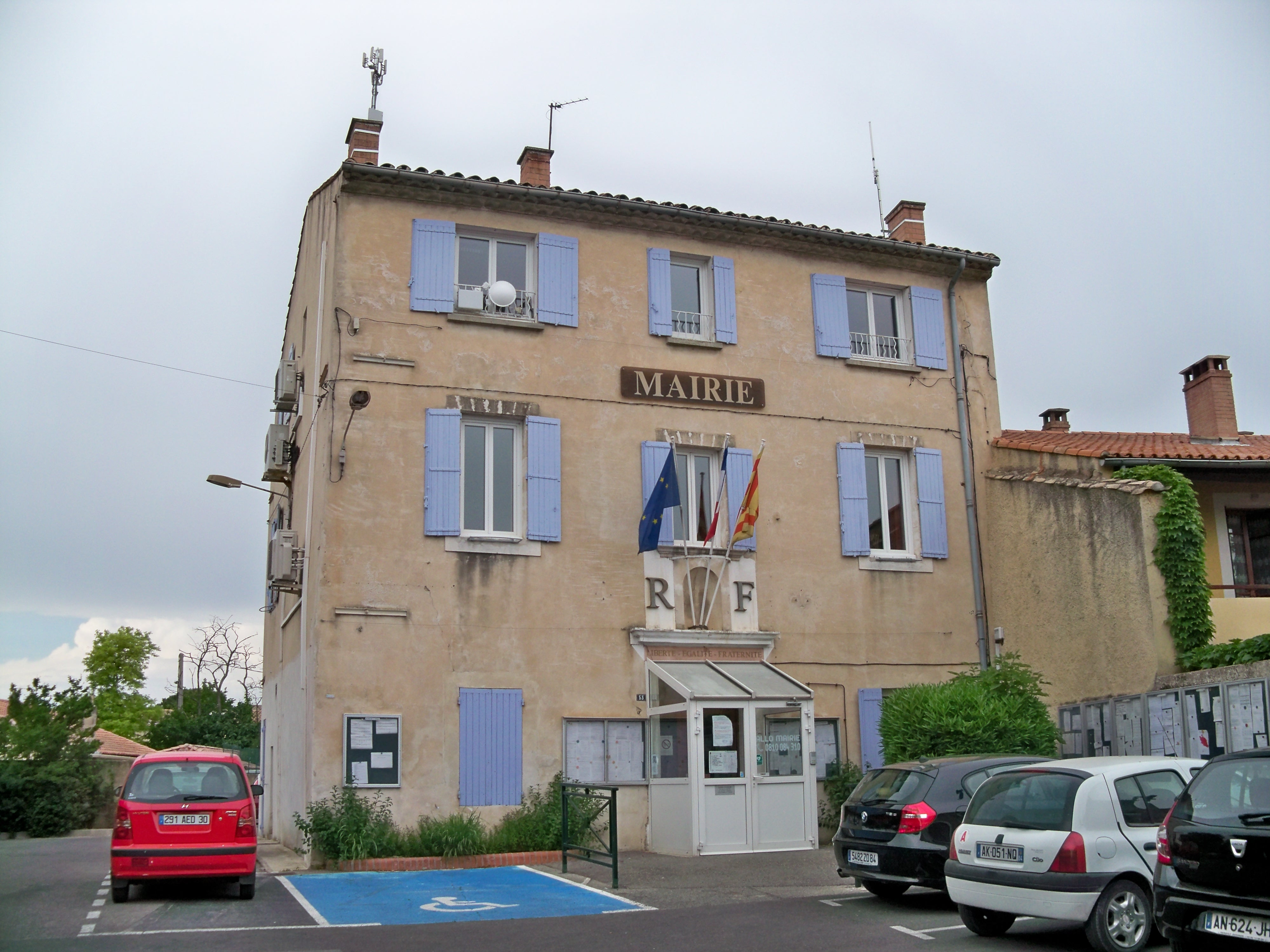 Mairie de Morières les Avignon, Vaucluse, France